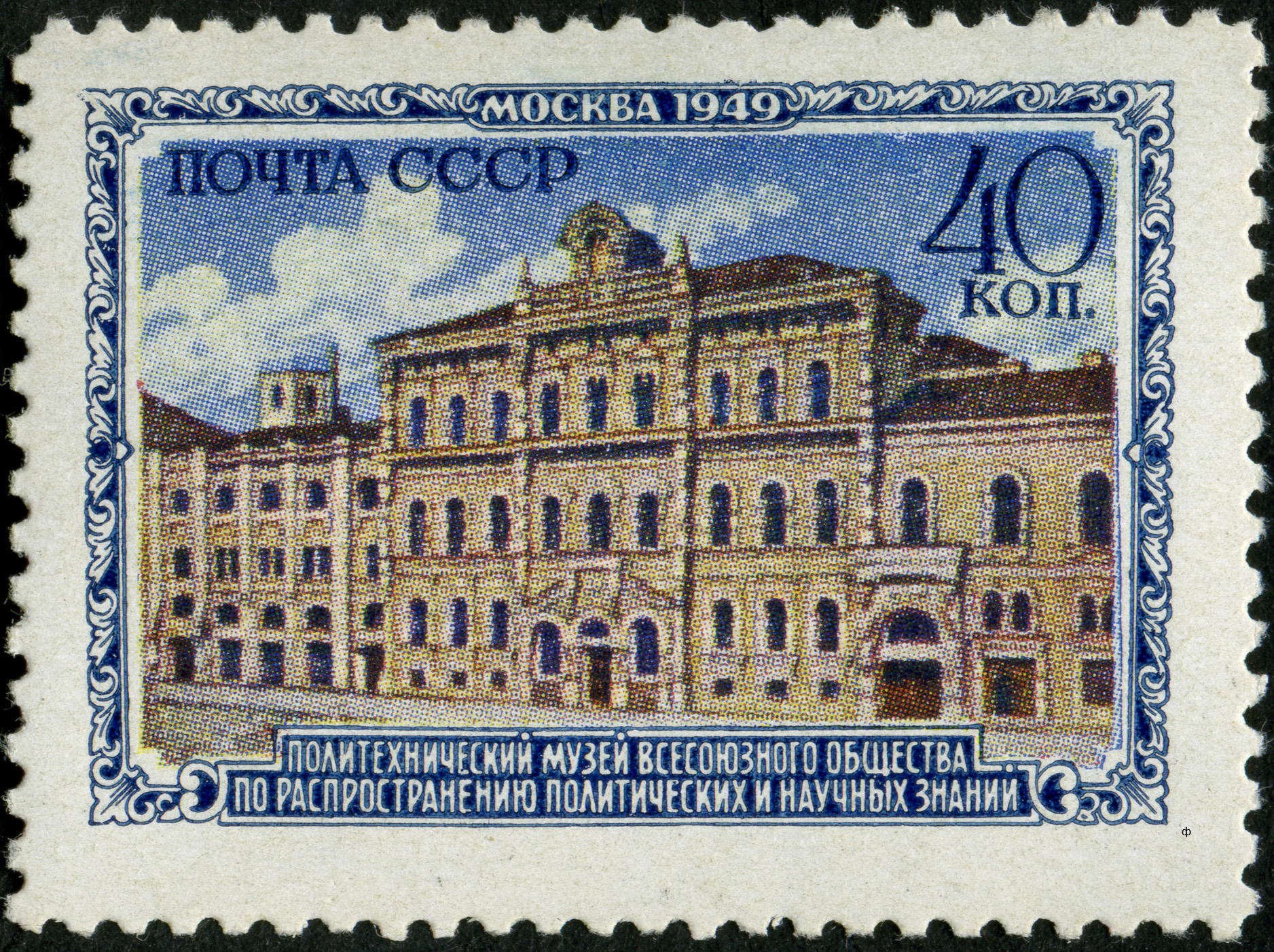 Марка СССР